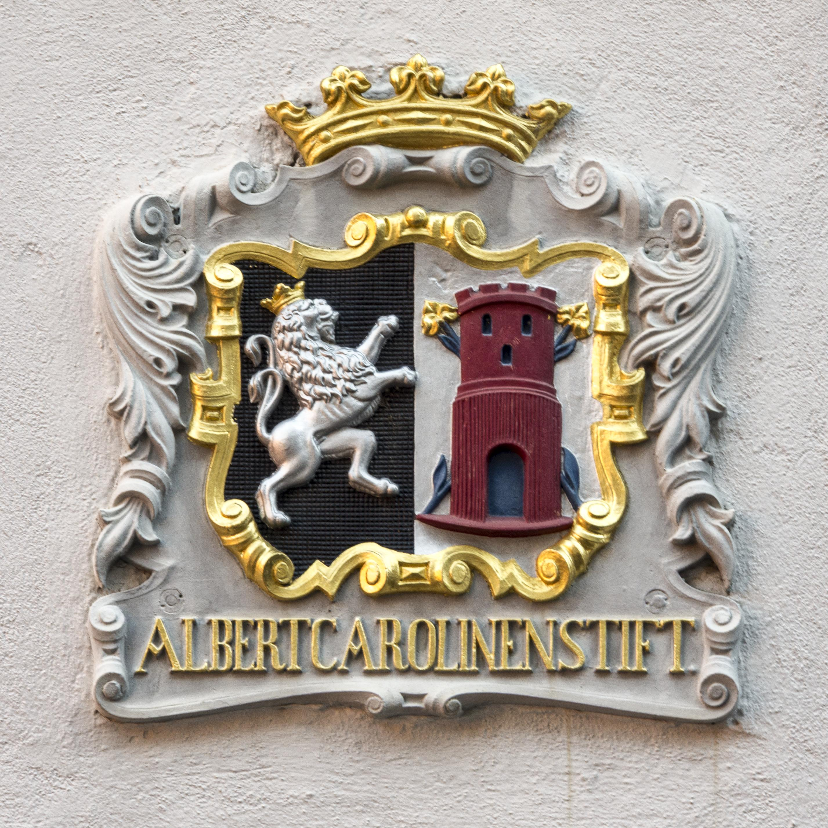 Gebäude in Freiburg